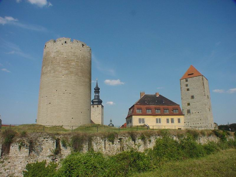 Burg Querfurt, eigenes Foto public domain Dicker Heinrich, Pariser Turm, Fürstenhaus und Marterturm